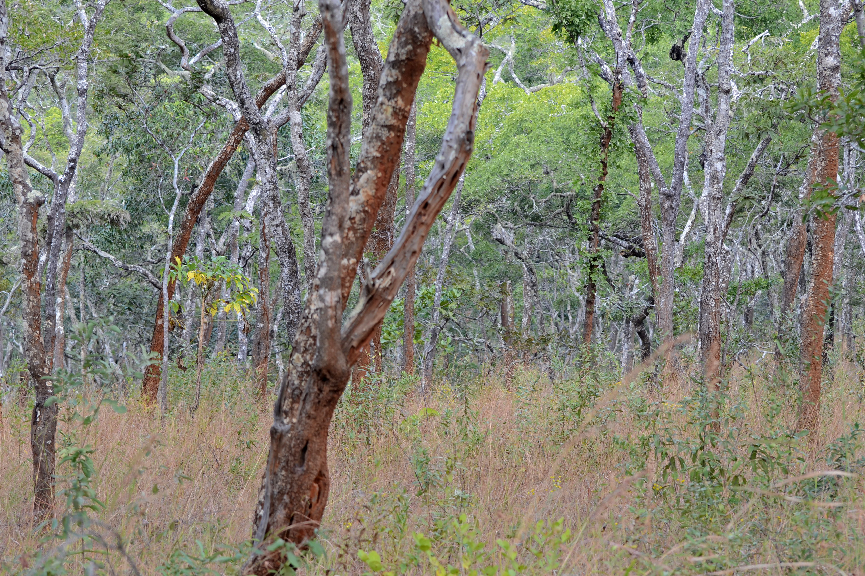 Nkhotakota Game Reserve, Malawi